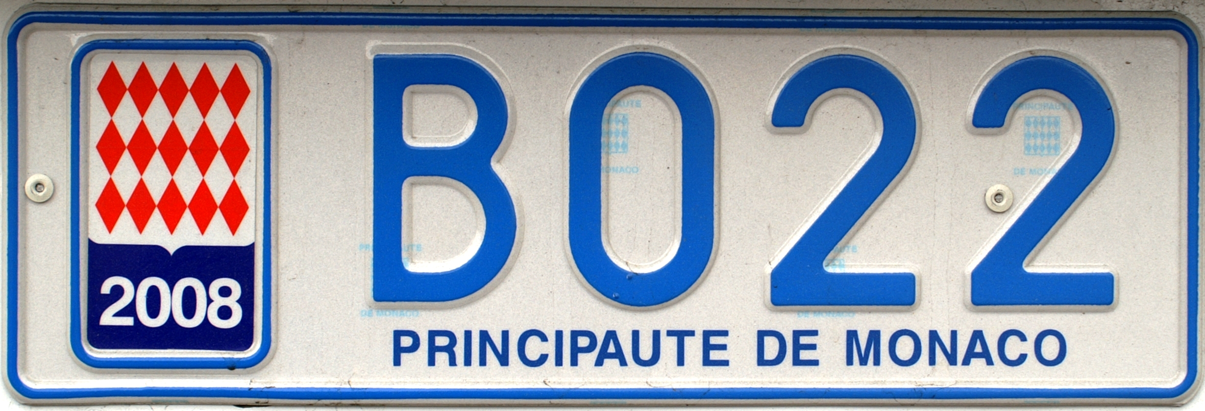 kentekenplaat Monaco